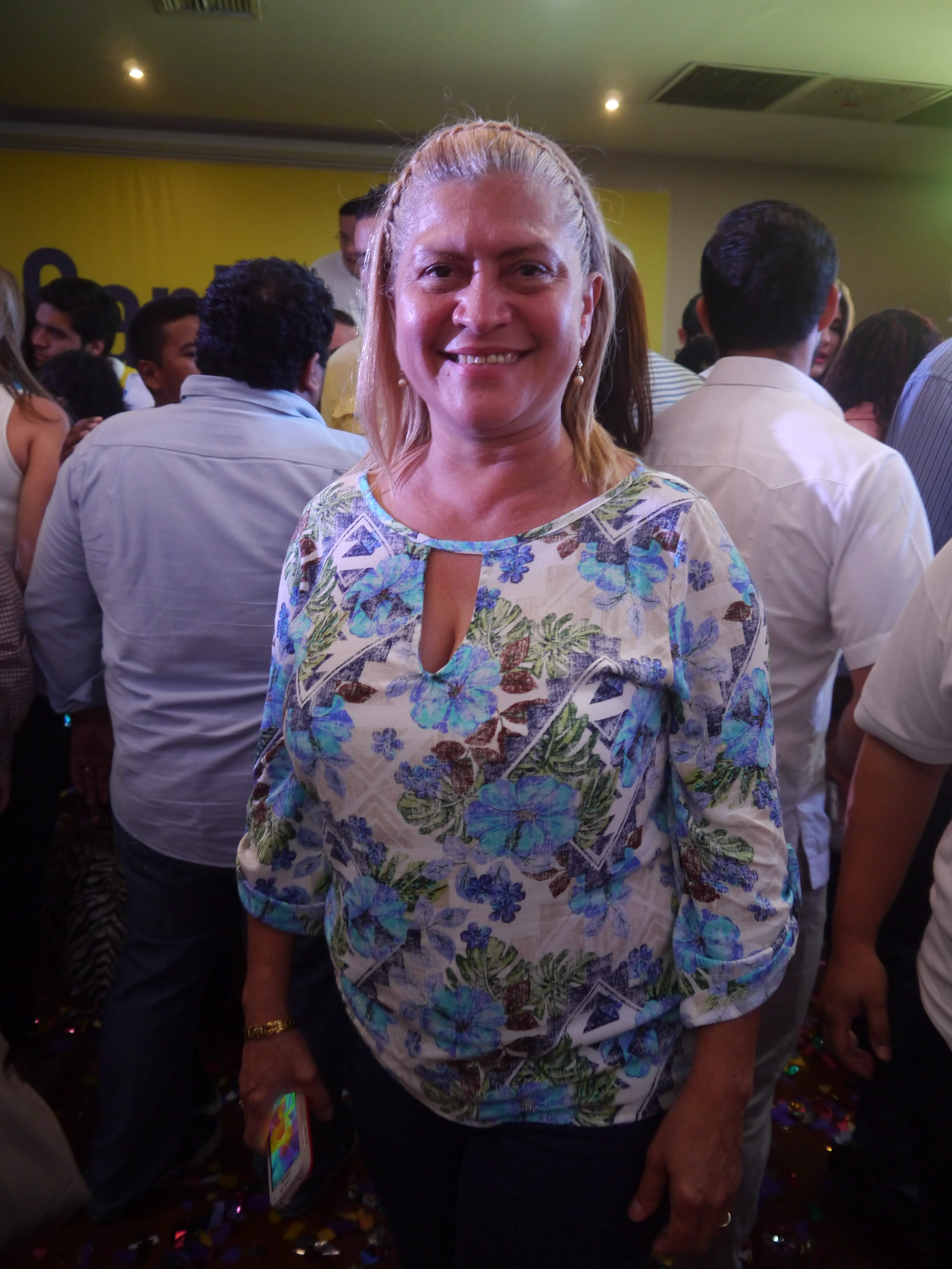 Concejala Consuelo Flores en evento de inauguración de La Cantera de la 6 en Guayaquil